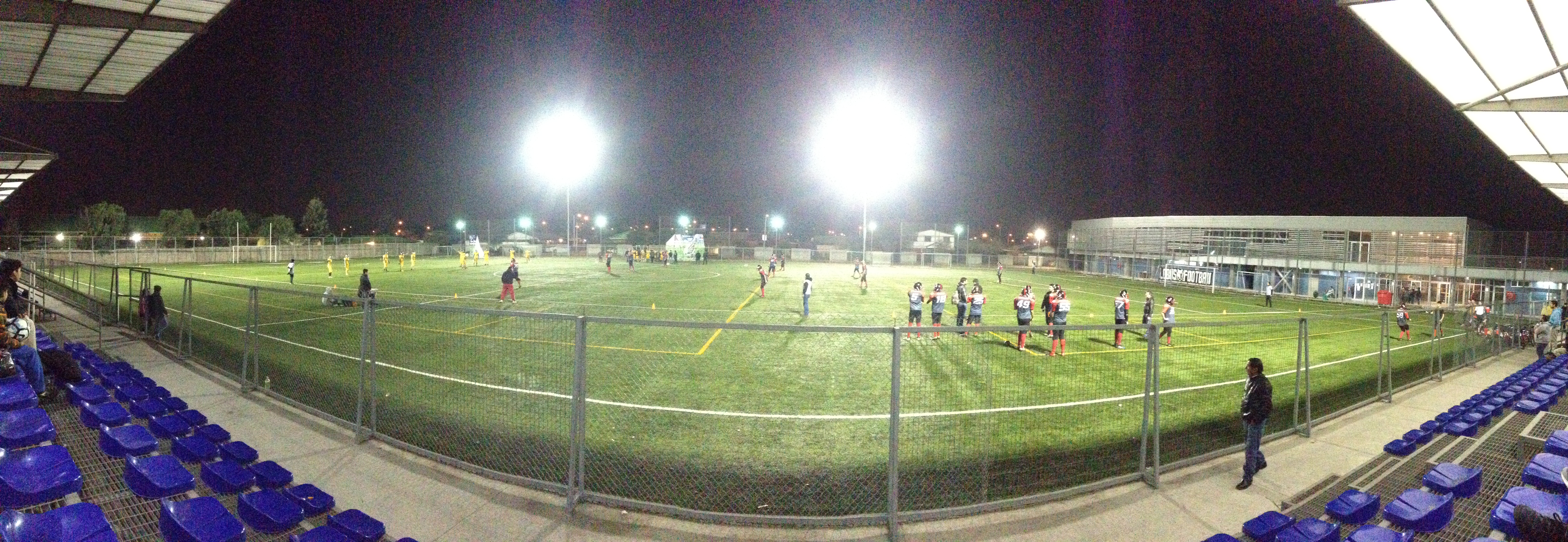 Panorámica tomada desde la gradería en un partido de fútbol americano entre Lobos vs Halcones